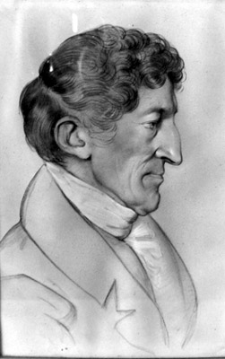 Carl Wilhelm Freiherr von Fritsch. Geboren in Weimar am 16.07.1769, gest. in Weimar am 16.10.1851. Großherzoglich Sächsischer Kammerherr, Wirklicher Geheimrat und Staatsminister, Ordenskanzler, Dr. jur. h. c. der Universität Jena.